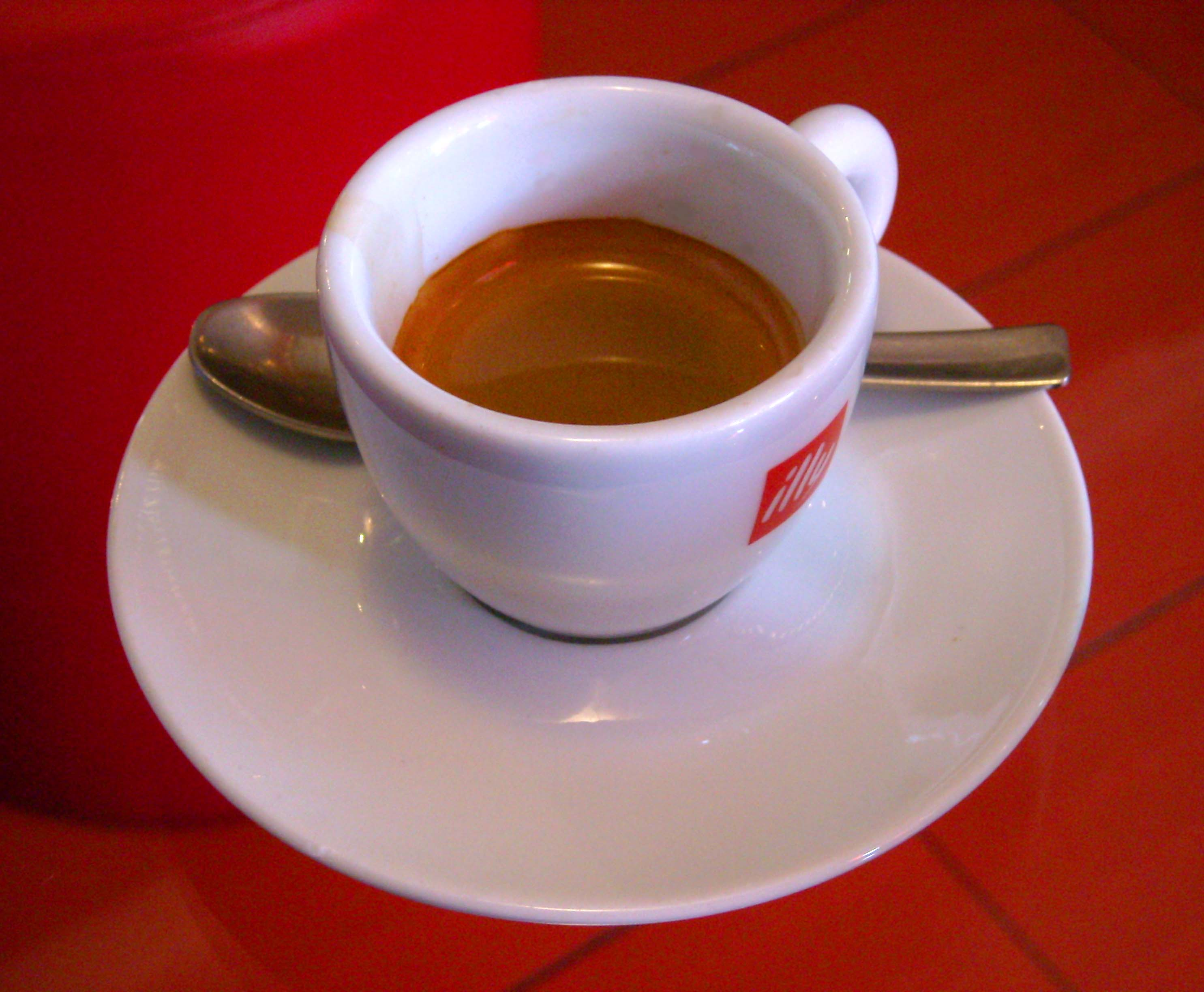 Una tazzina di caffè a Ventimiglia, Liguria, Italia.